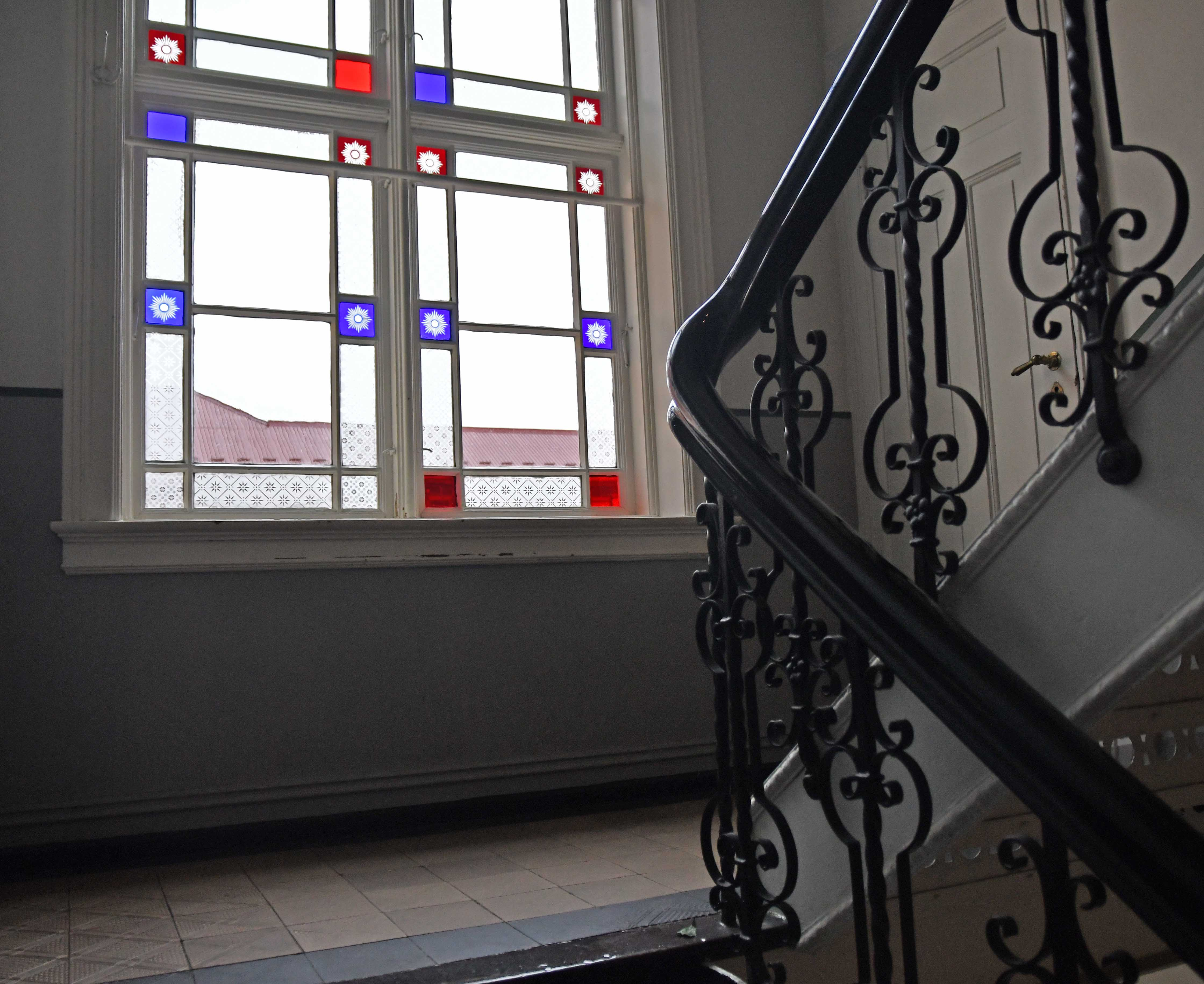 Trapperom i Øvrefoss 2, Grünerløkka, ferdig 1897, arkitekt S.R. Gulbrandsen (kilde: artemisia.no), med glassmalerier og smijernsrekkverk.